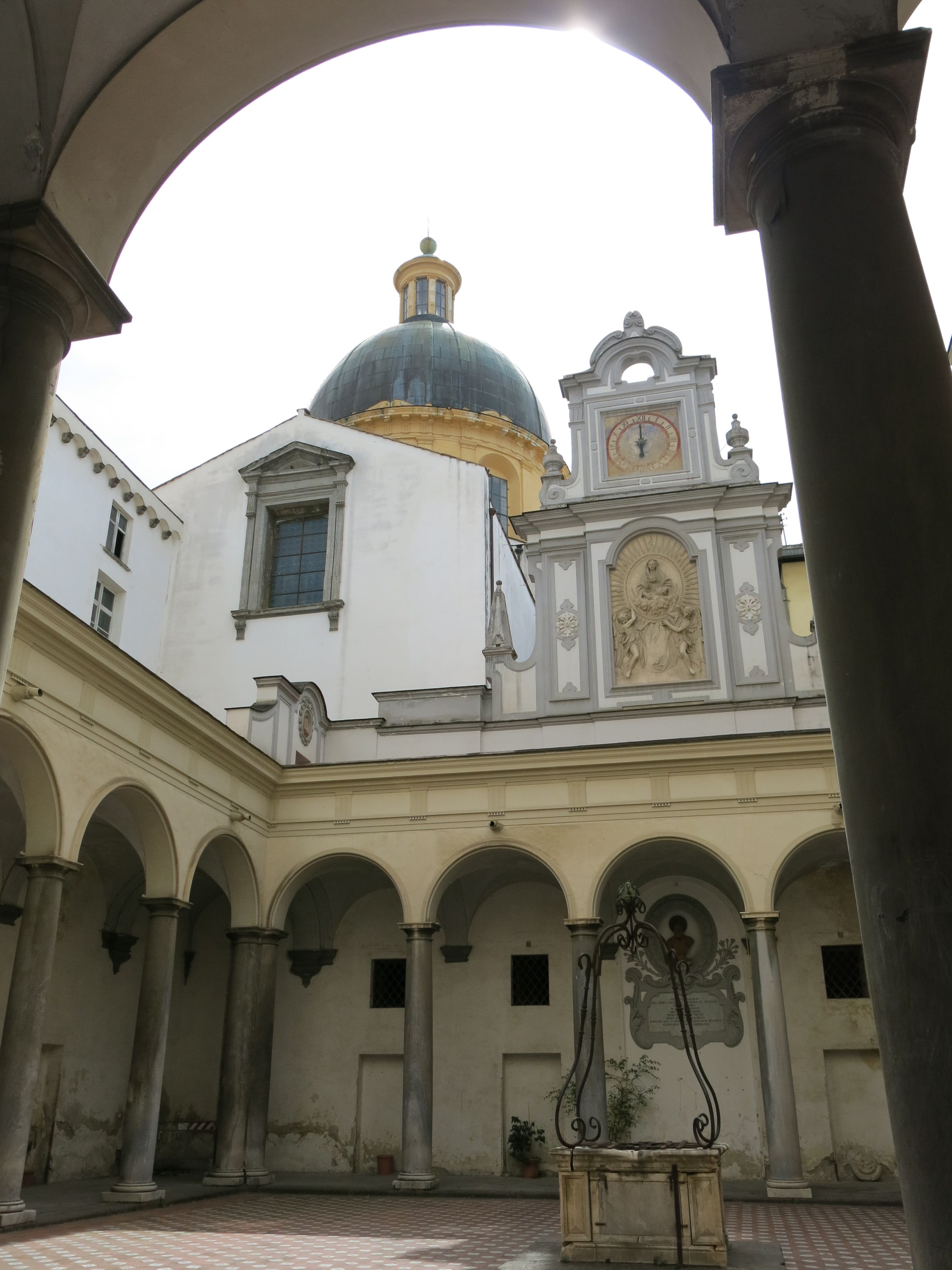 Le chiese di Napoli